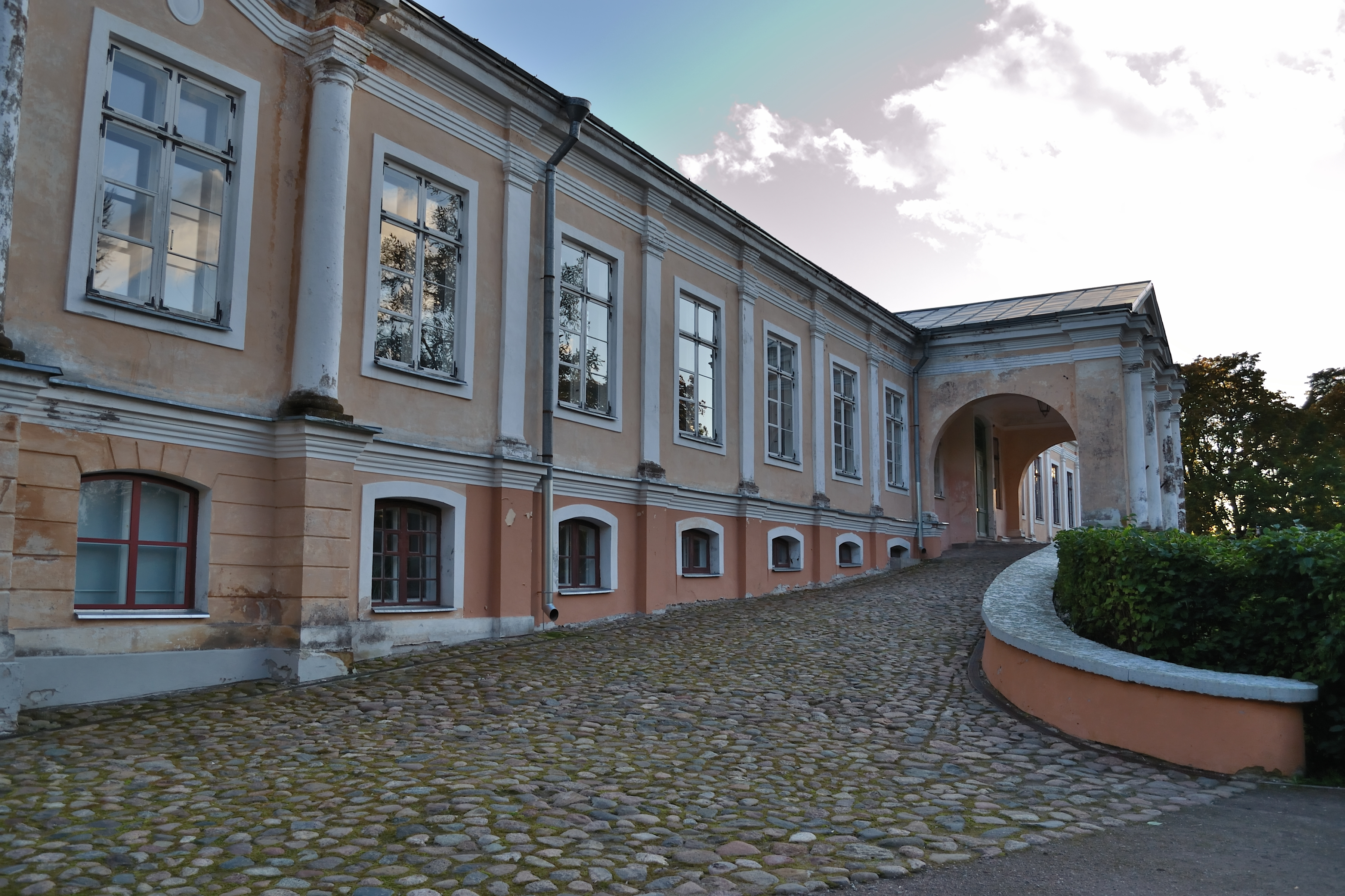 Vääna mõisa peahoone 18.-19.saj